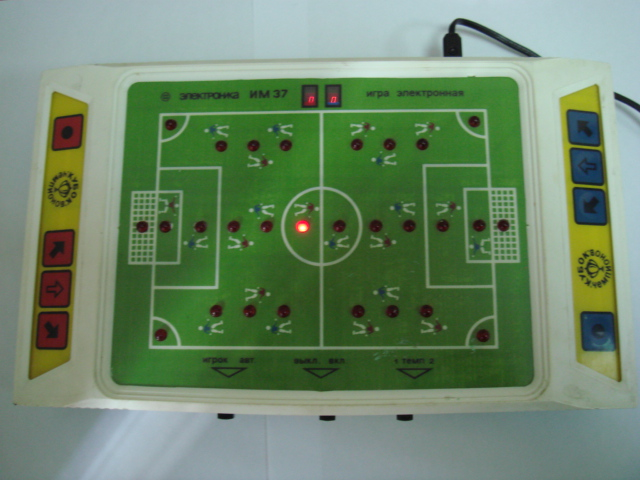 ИМ-37